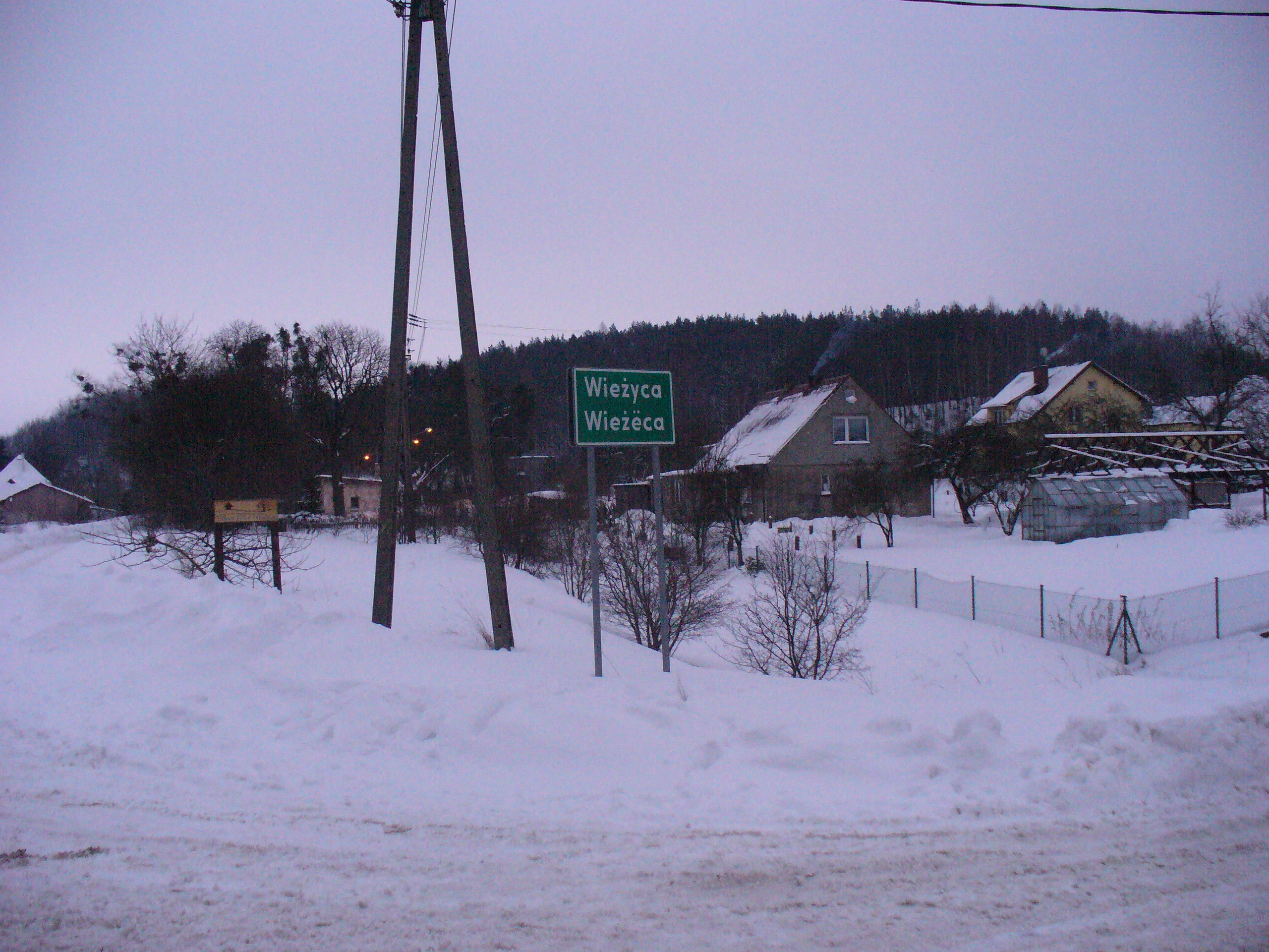 Kaszebska Wieżyca